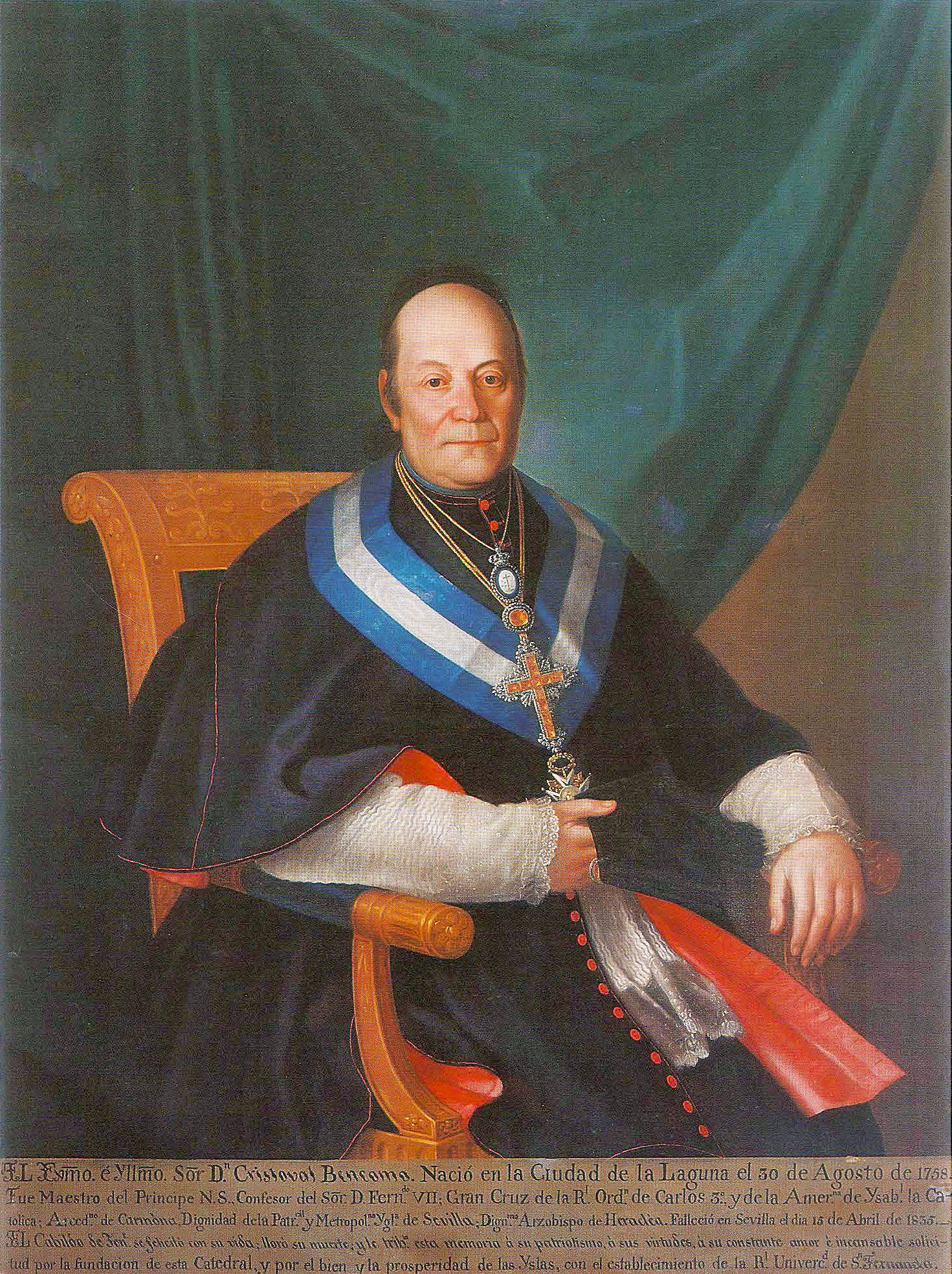 Gemälde des Erzbischofs Cristóbal Bencomo y Rodríguez (1758-1835), von Luis de la Cruz im Kapitelsaal der Kathedrale von San Cristóbal de La Laguna (Teneriffa)